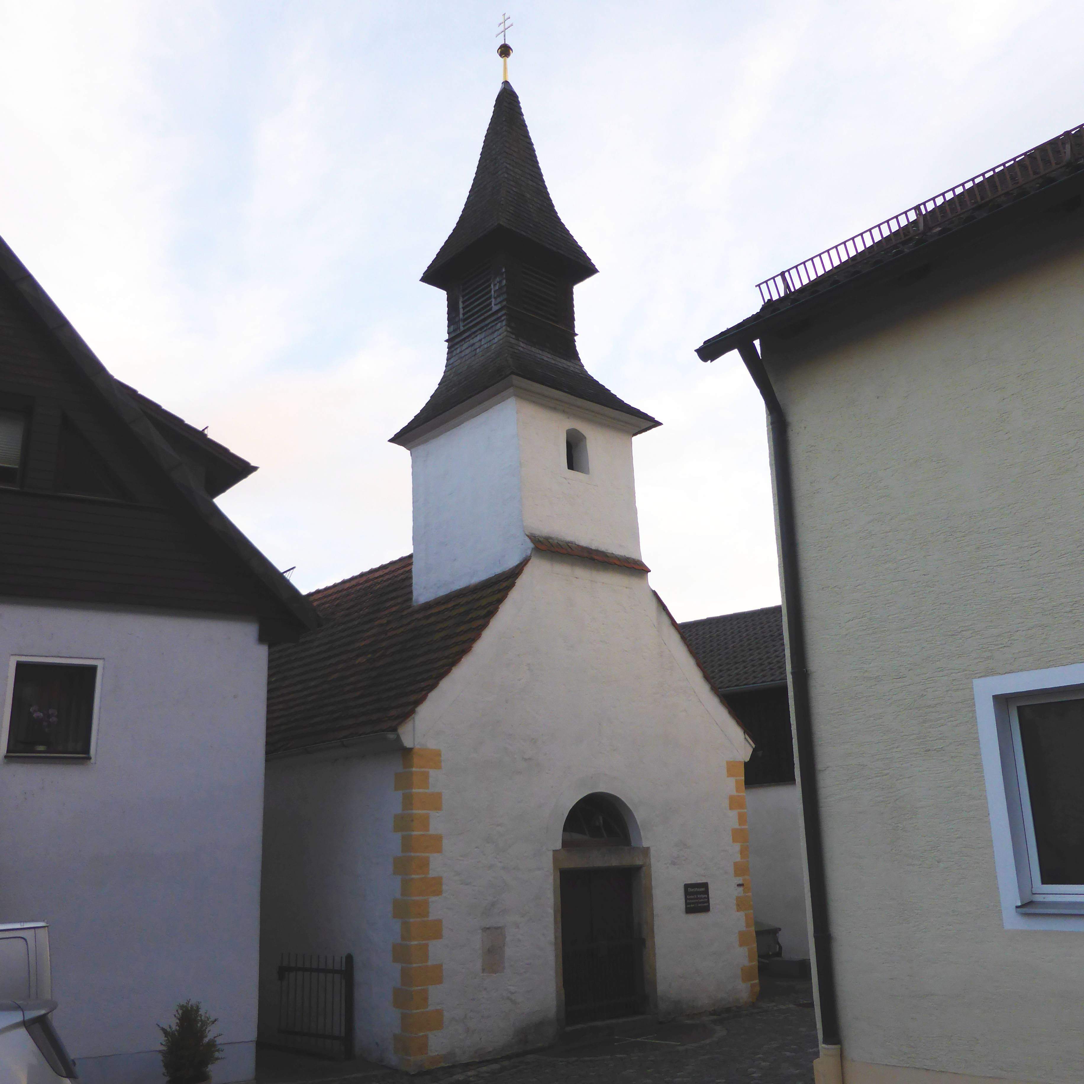 Etterzhausen (Evang.-luth. Kirche St. Wolfgang)